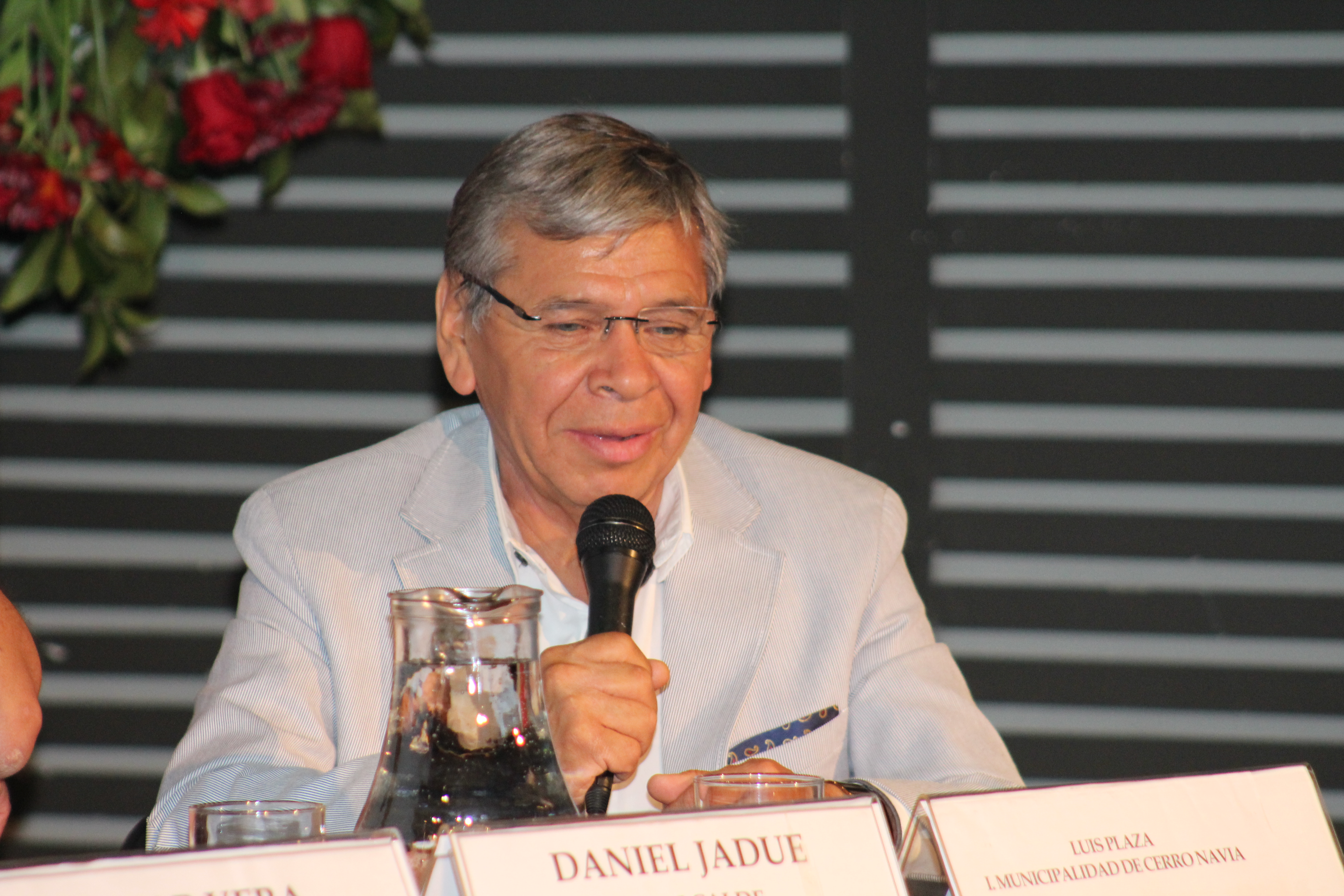 Alcalde de Cerro Navia, Luis Plaza